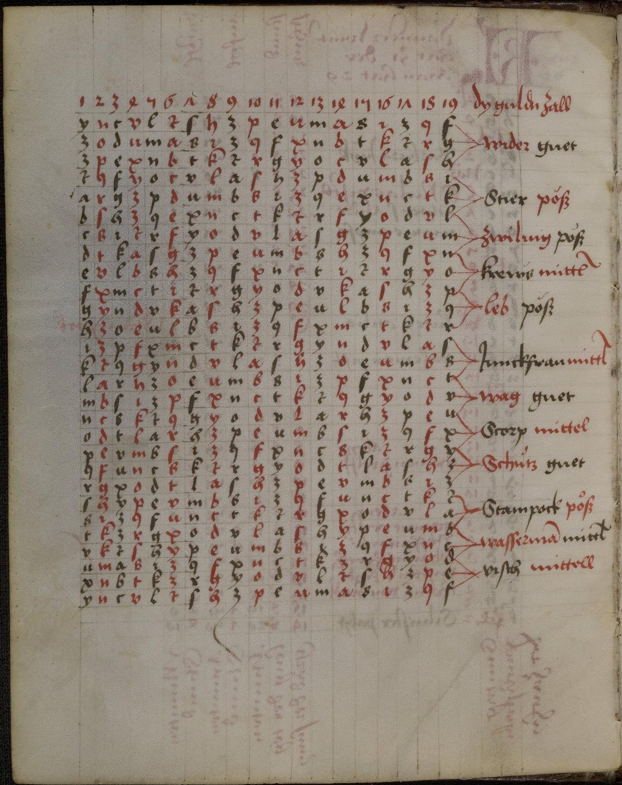 Codex Palatinus germanicus 15, Blatt 13v - Tabelle: Goldene Zahl und Sternkreiszeichen